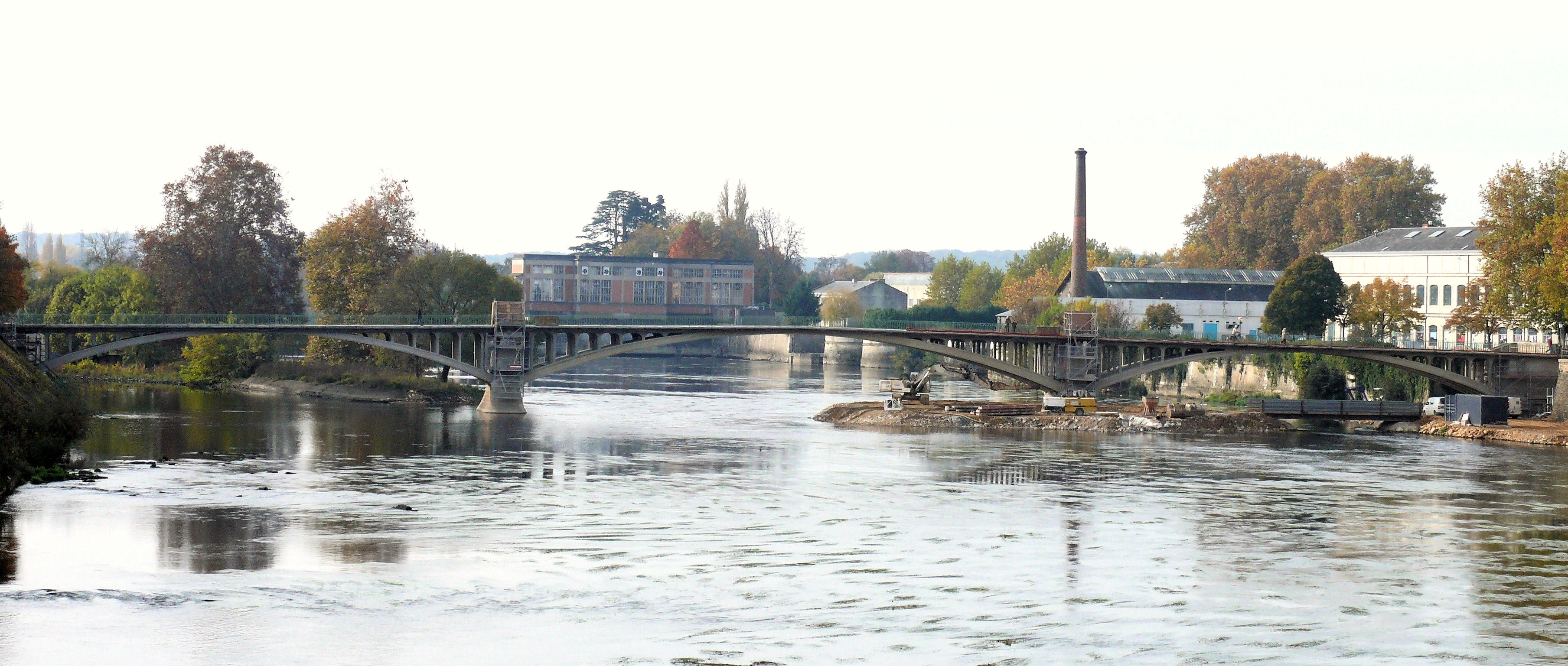 Châtellerault - Pont Camille-de-Hogues vu de l'aval et la Manufacture